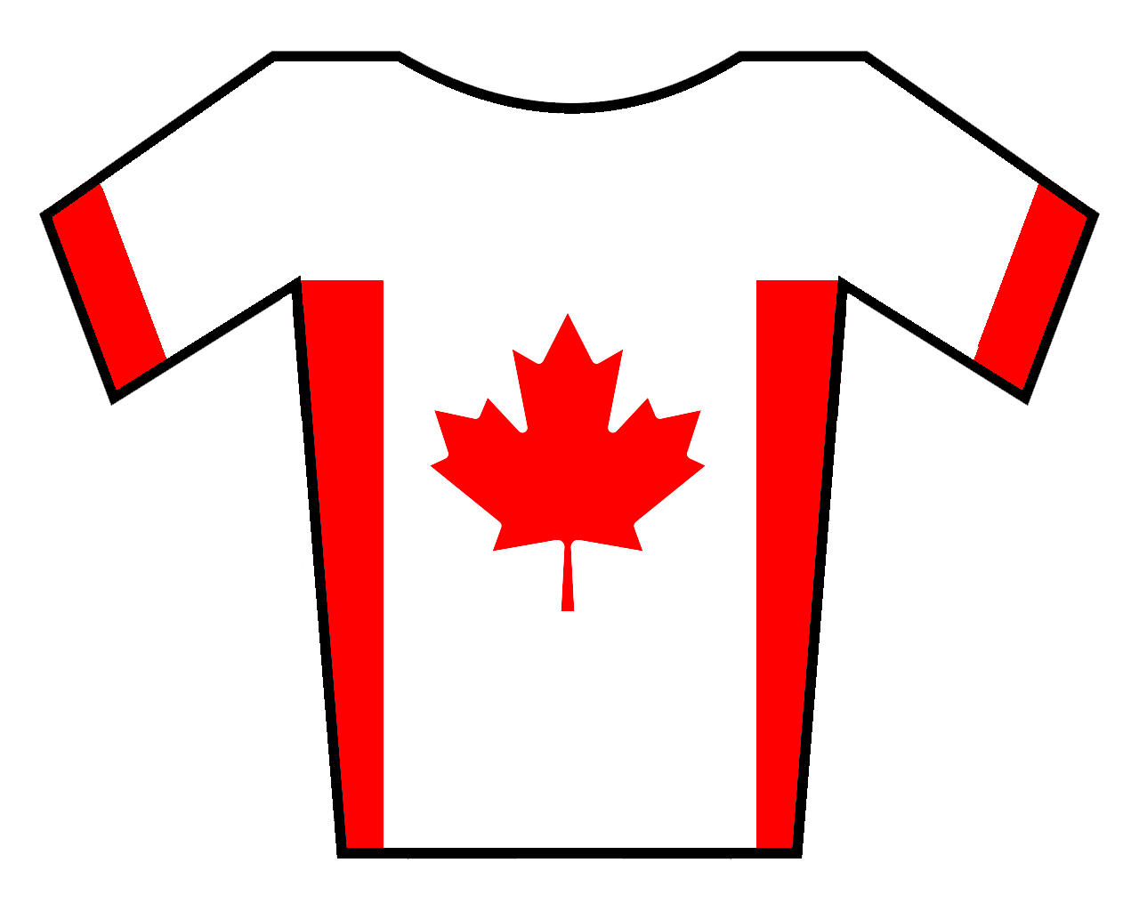 Maillot de Canadá